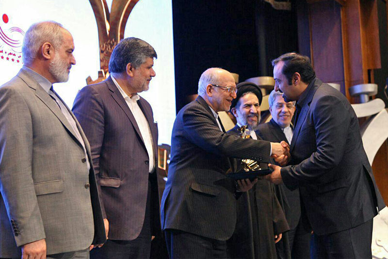 Snowa-post-neshn-hemayat-masraf-konande